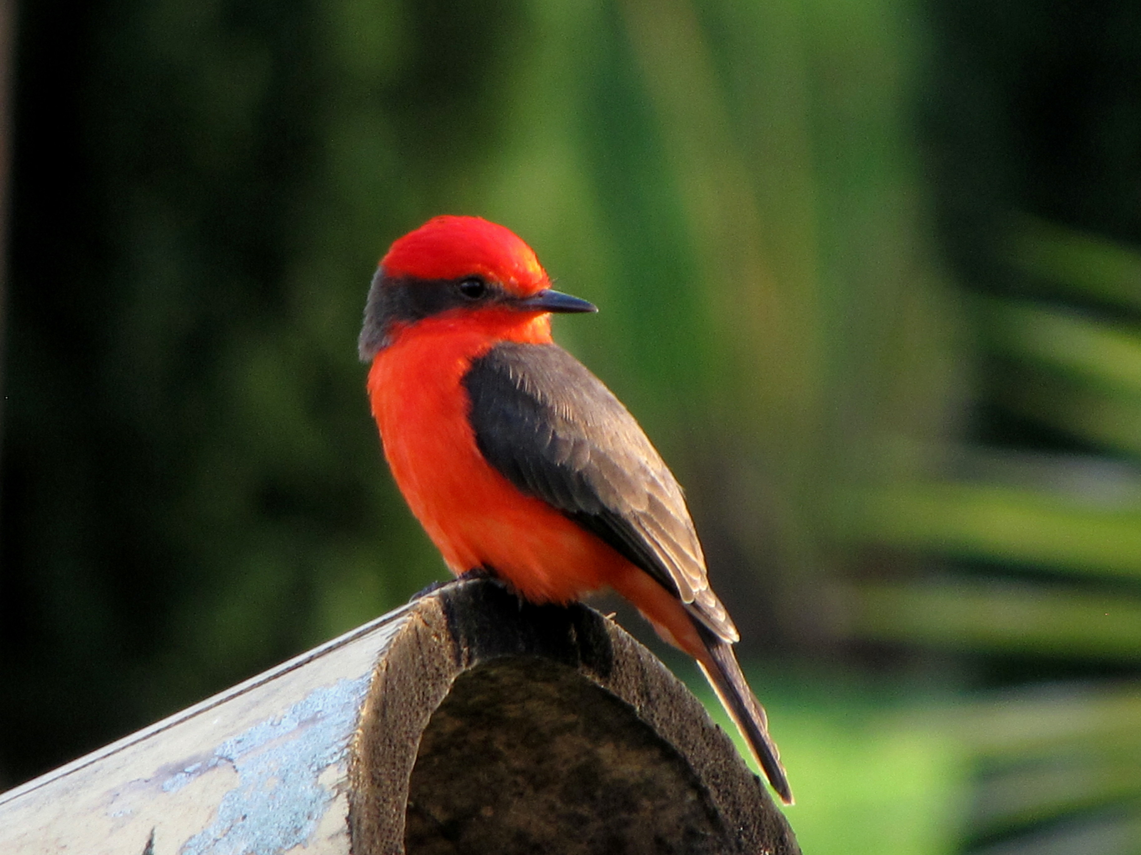 Pyrocephalus rubinus (Petirrojo, Pechirrojo, Cardenal) - Macho adulto